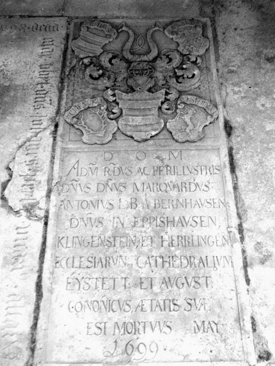 Grabplatte des Marquard Anton von Bernhausen, Herr in Herrlingen, im Mortuarium des Eichstätter Domes. Blaustein, Deutschland.